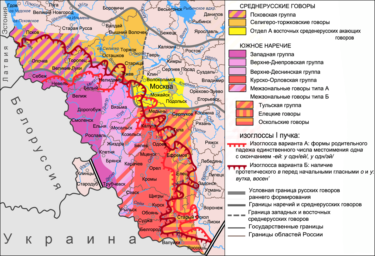 Карта южнорусских и среднерусских групп говоров в ареалах вариантов А и Б I пучка изоглосс юго-западной диалектной зоны. Источники: Захарова К. Ф., Орлова В. Г. Диалектное членение русского языка — 2-е изд. — М.: Едиториал УРСС, 2004. — ISBN 5-354-00917-0, с. 97. Язык русской деревни. Диалектологический атлас. — Наречия и диалектные зоны. Бромлей С. В., Булатова Л. Н., Гецова О. Г. и др. Русская диалектология / Под ред. Л. Л. Касаткина. — М.: Издательский центр «Академия», 2005. — ISBN 5-7695-2007-8, c. 257 Захарова К. Ф., Орлова В. Г. Диалектное членение русского языка — 2-е изд. — М.: Едиториал УРСС, 2004. — ISBN 5-354-00917-0, приложение: Диалектологическая карта русского языка (1964 г.). Касаткин Л. Л. Русские диалекты. Лингвистическая география // Русские. Монография Института этнологии и антропологии РАН. — М.: Наука, 1999. — С. 93—94.